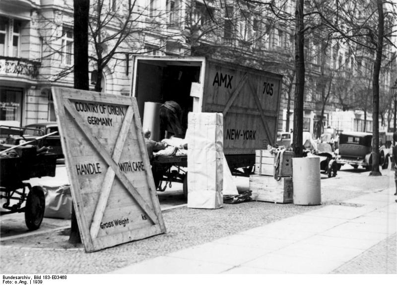 Berlin, Emigration von Juden, Umzugswagen ADN-ZB/Archiv Berlin 1939: Jüdische Familien aus dem Berliner Westen emigrieren in die USA. Ihre Möbel werden in Überseekisten einer Hamburger Expeditionsfirma verladen. [Scherl]